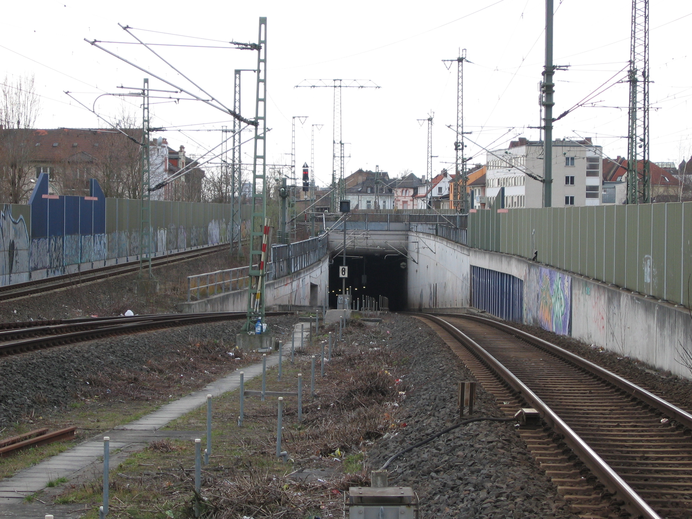 Entrance to the City-Tunnel Offenbach in Offenbach am Main-Ost / Einfahrt in den City-Tunnel in Offenbach am Main-Ost